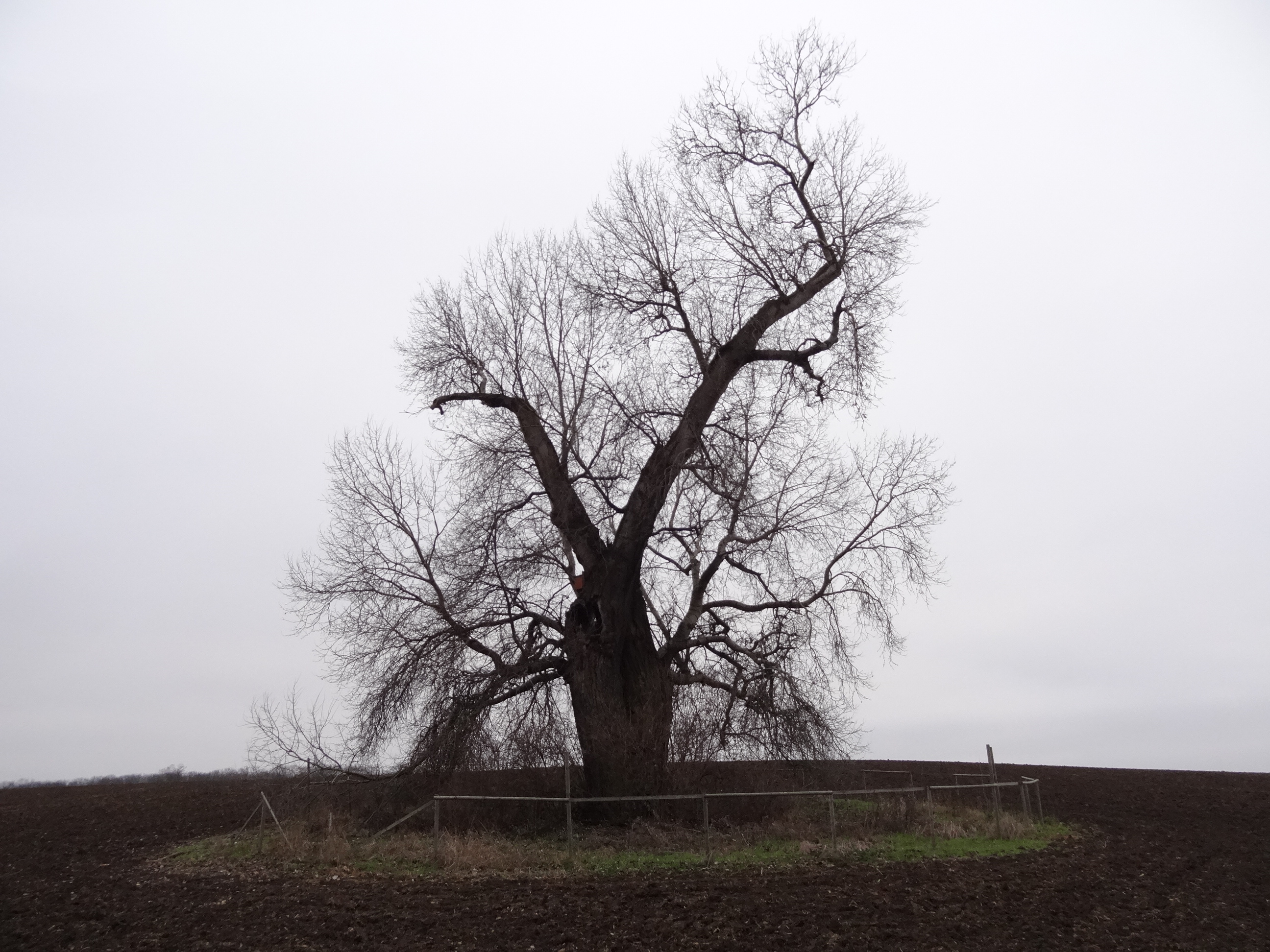 Satalice - památný topol bílý v poli mezi Satalicemi a Vinoří